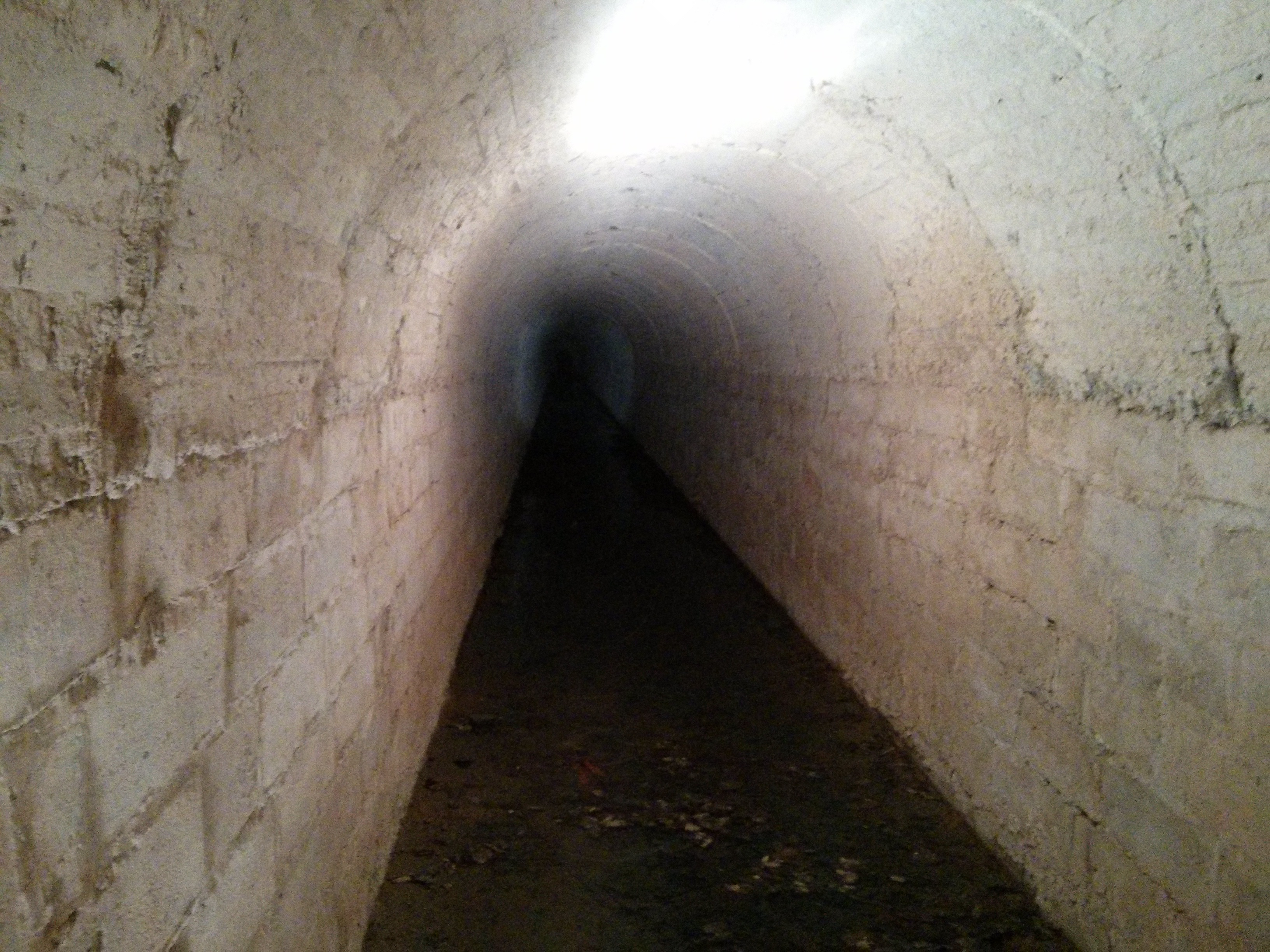 Galería lateral auxiliar de entrada en la parte burgalesa.